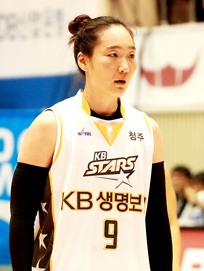 160220 여자농구 KDB생명 vs KB스타즈 직찍